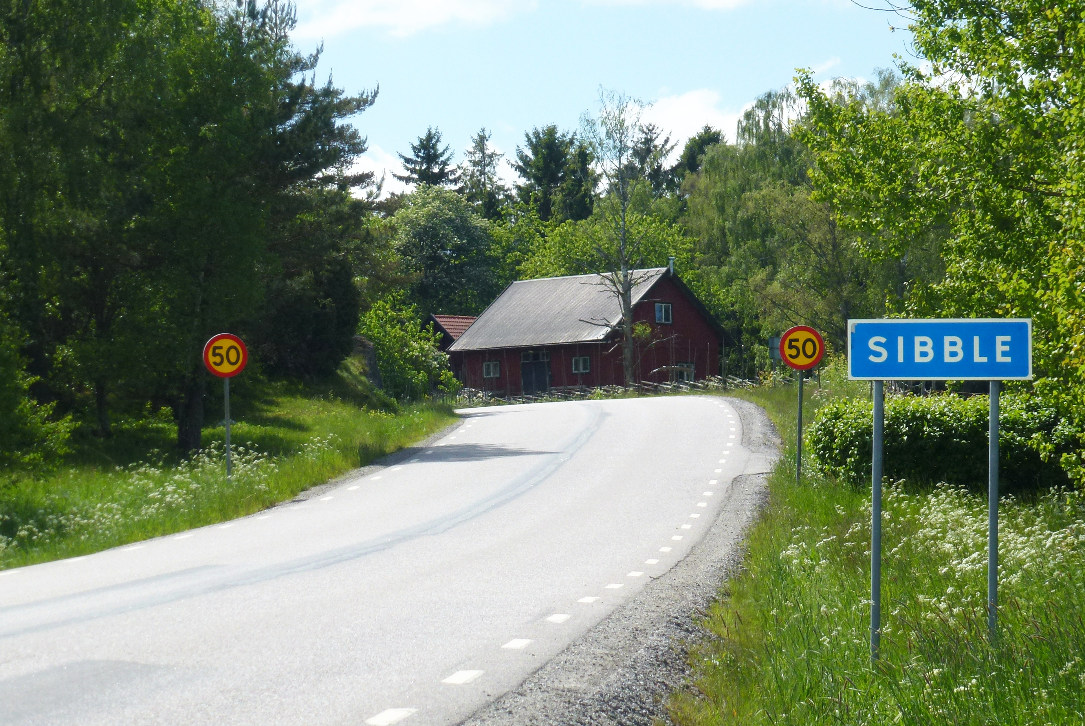 Infart till Sibble